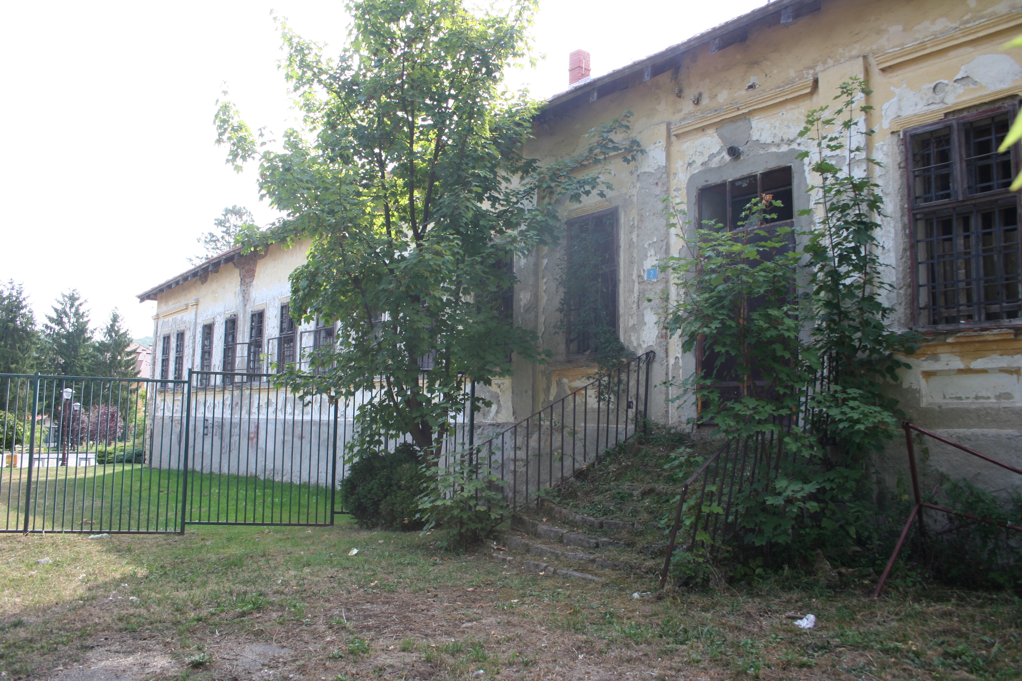 Zgrada sreskog načelstva u Kosjeriću